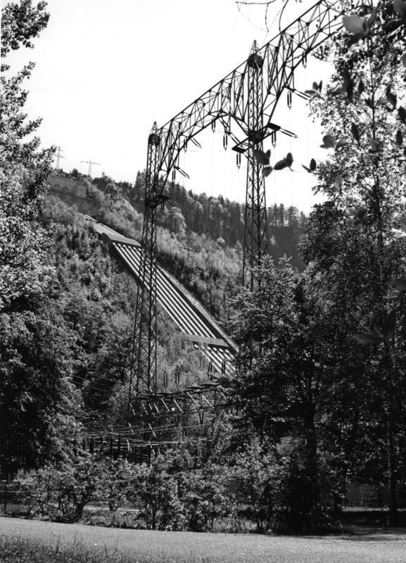 Walchensee Kraftwerk/Oberbayern